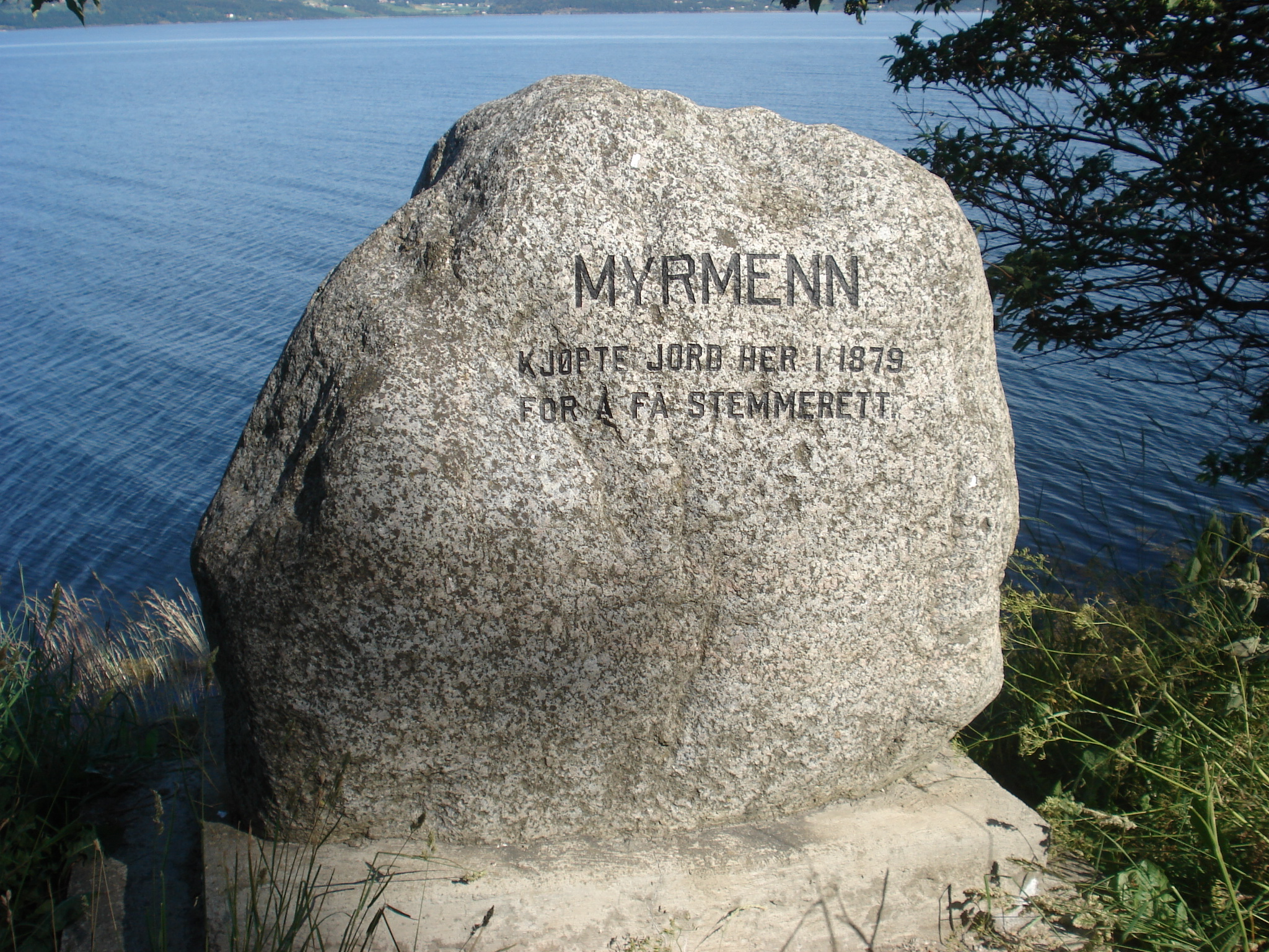 Minnesteinen over myrmenn på Framnes på Ekne